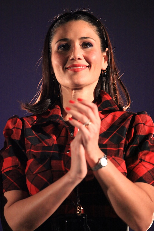 Barbara Tabita au Festival international du film d'amour de Mons